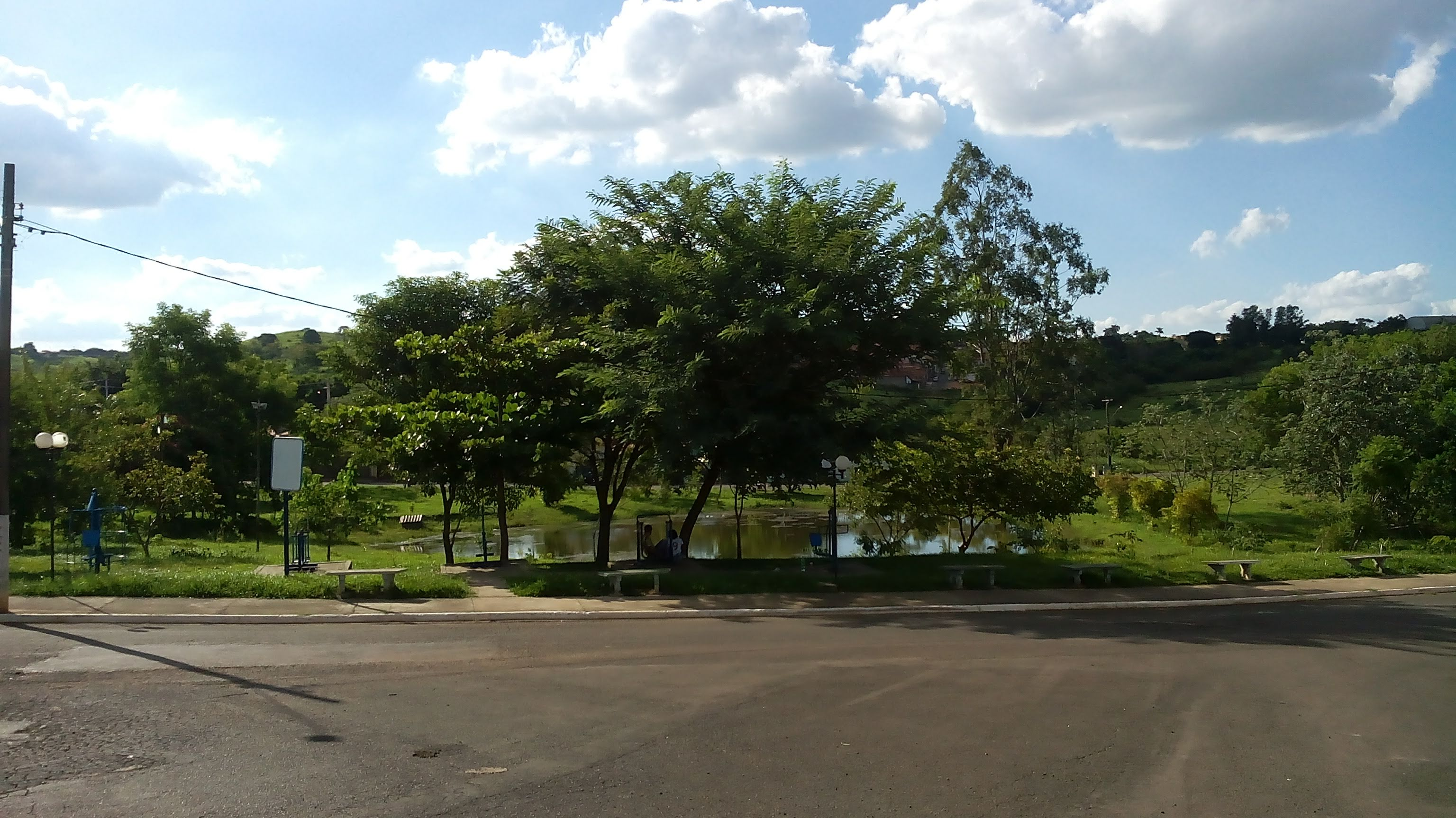 Vista para a Praça Domingos Fuglini, bairro Conjunto Habitacional Pedro Zanella, em Laranjal Paulista.